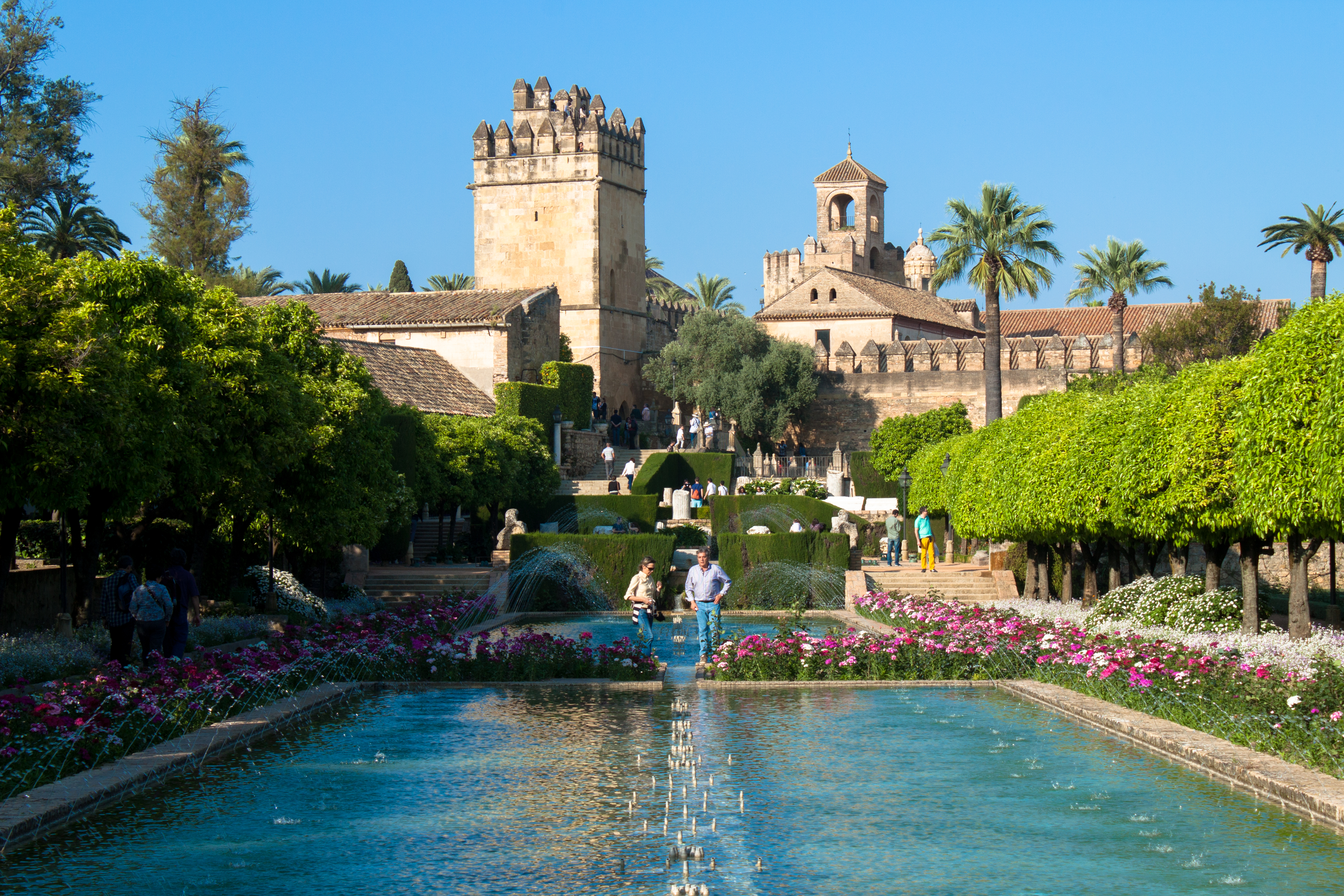 Alcázar de los Reyes Cristianos, Córdoba (España).